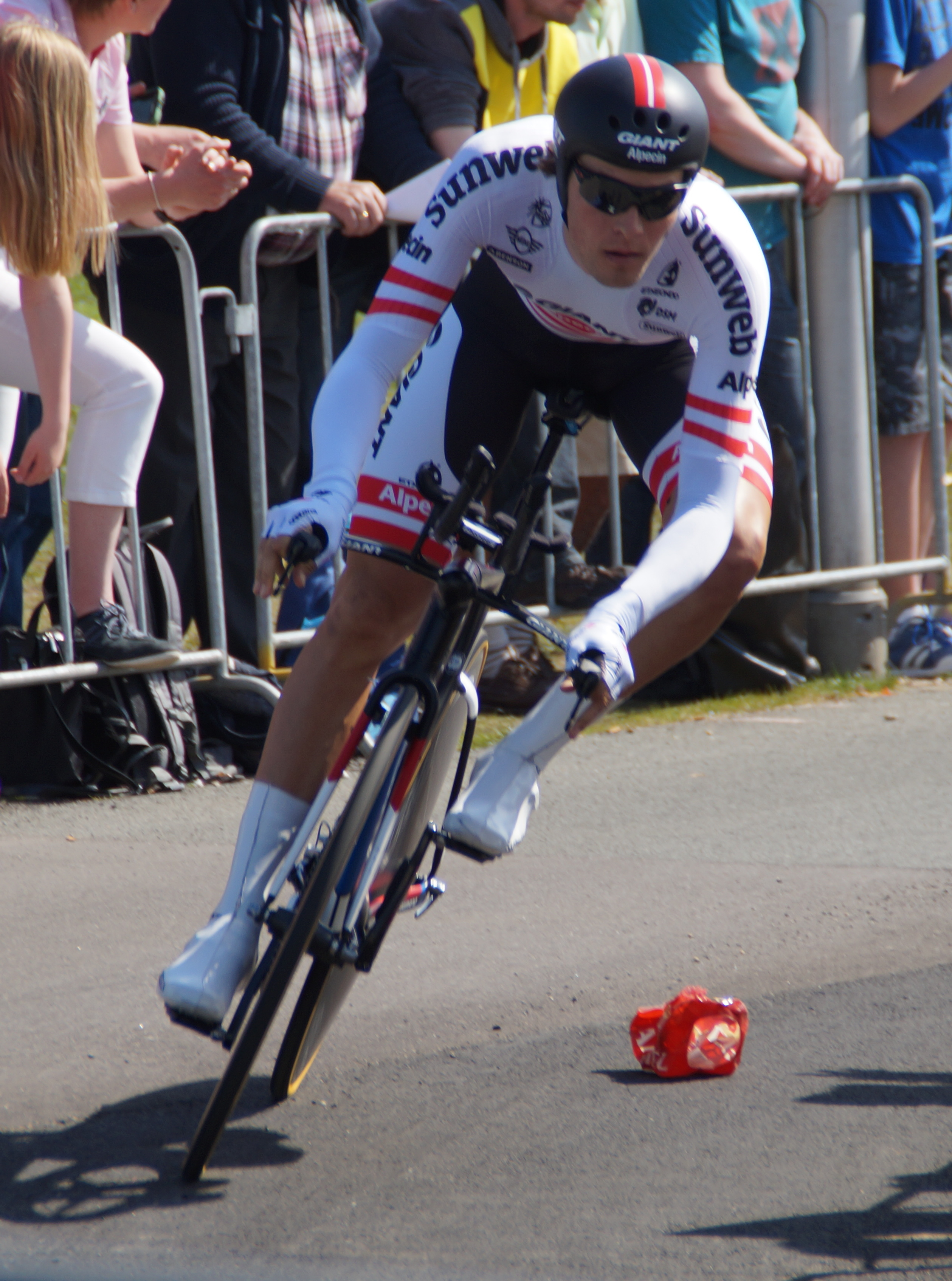 DSC04846 Georg Preidler